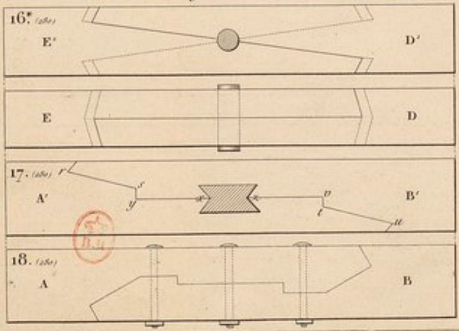 Fig. 16 : Trait de Jupiter double, à fausses entailles en coupes inverses. Fig. 17 : Trait de Jupiter avec coupes droites, fausses coupes, et clé en queue d'hironde. Fig. 18 : Trait de Jupiter sans clef et boulonné. Illustration issue de la planche XXI. Des commentaires sur ces assemblages sont disponibles dans Traité de la Charpenterie, Vol. 1 A-R Emy, pp. 279-281.